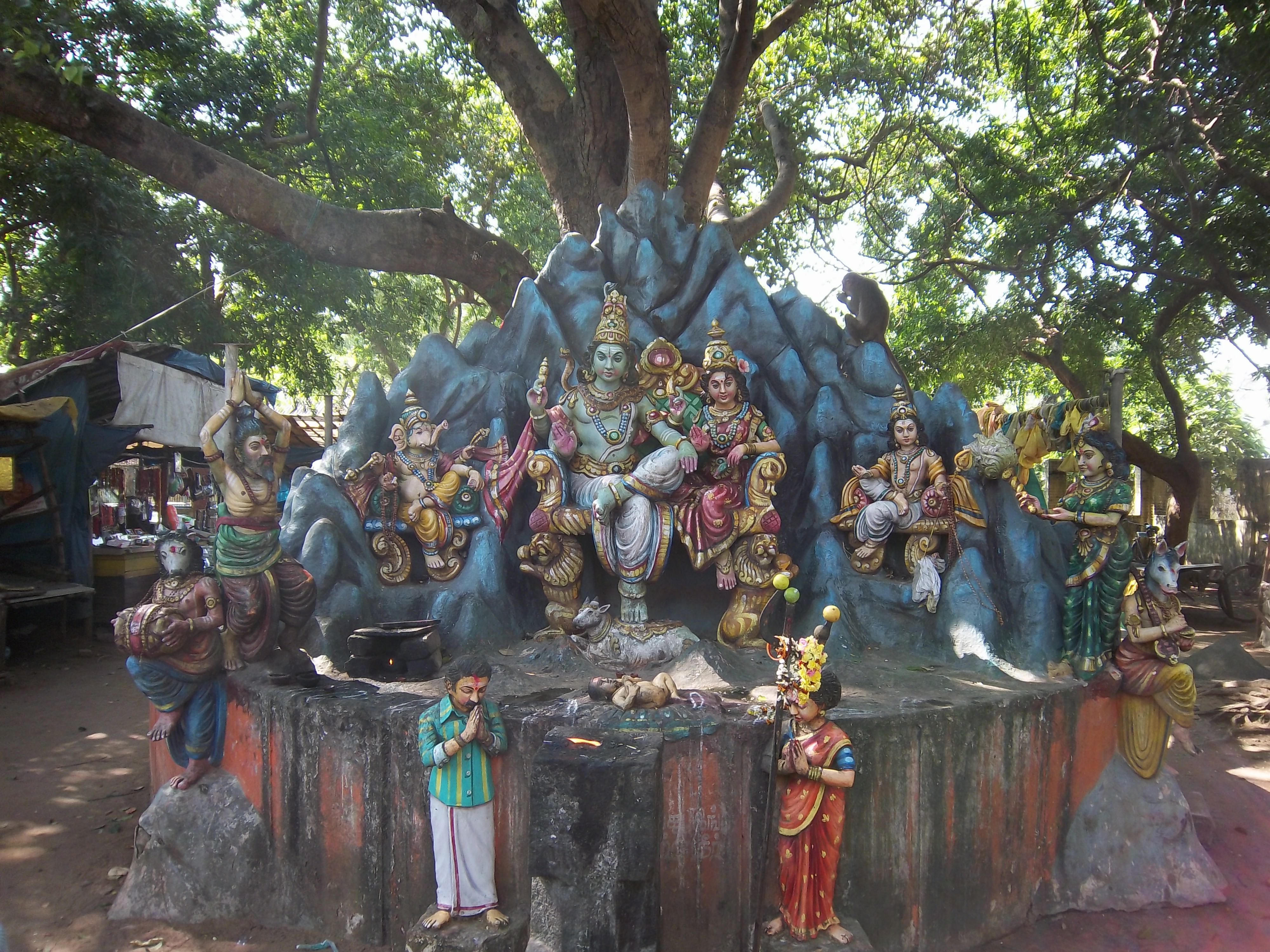 கொளஞ்சியப்பர் கோயிலில் உட்புறம் அமைந்துள்ள சிவன், பார்வதி, விநாயகர், முருகன் சிலை